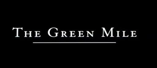 Заставки из фильма «The Green Mile»